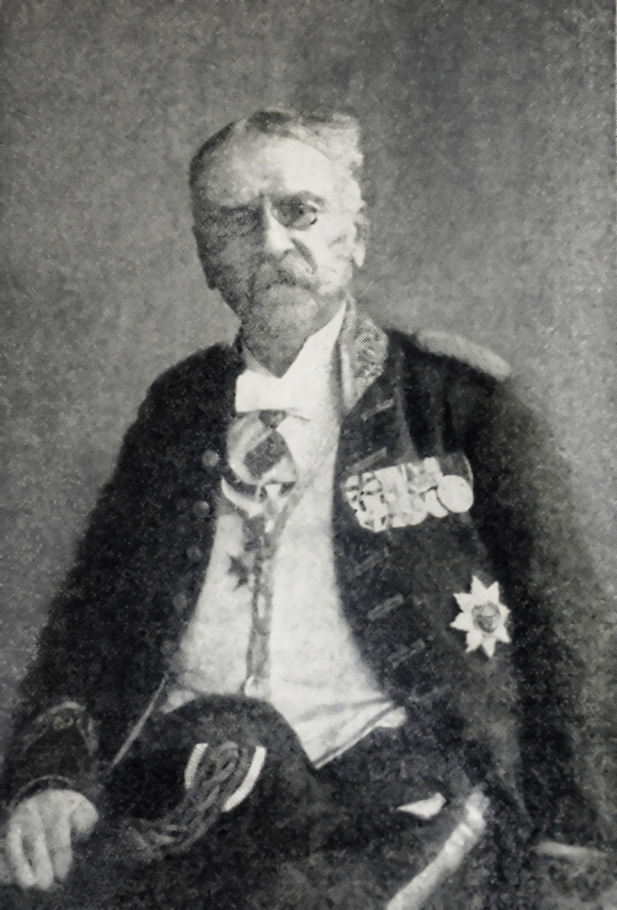 Dr. Hans Federath, geheimer Regierungsrat u. Landrat, Ehrenbürger der Stadt Brilon, gest. 1914,Bild aus Zeitung von 1914, Olsberg, Nordrhein-Westfalen, Deutschland